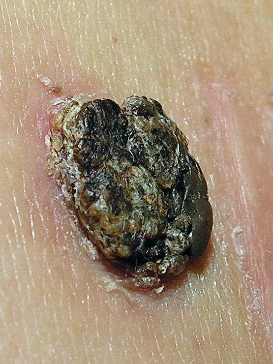 Queratose seborreica